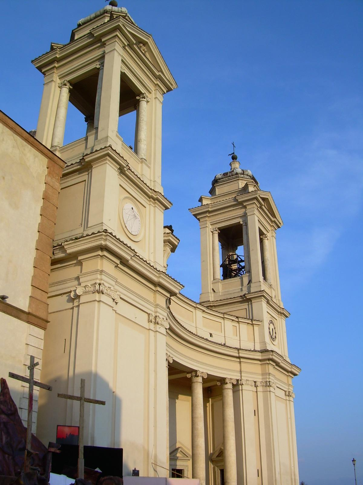 Collegiata, Valmontone